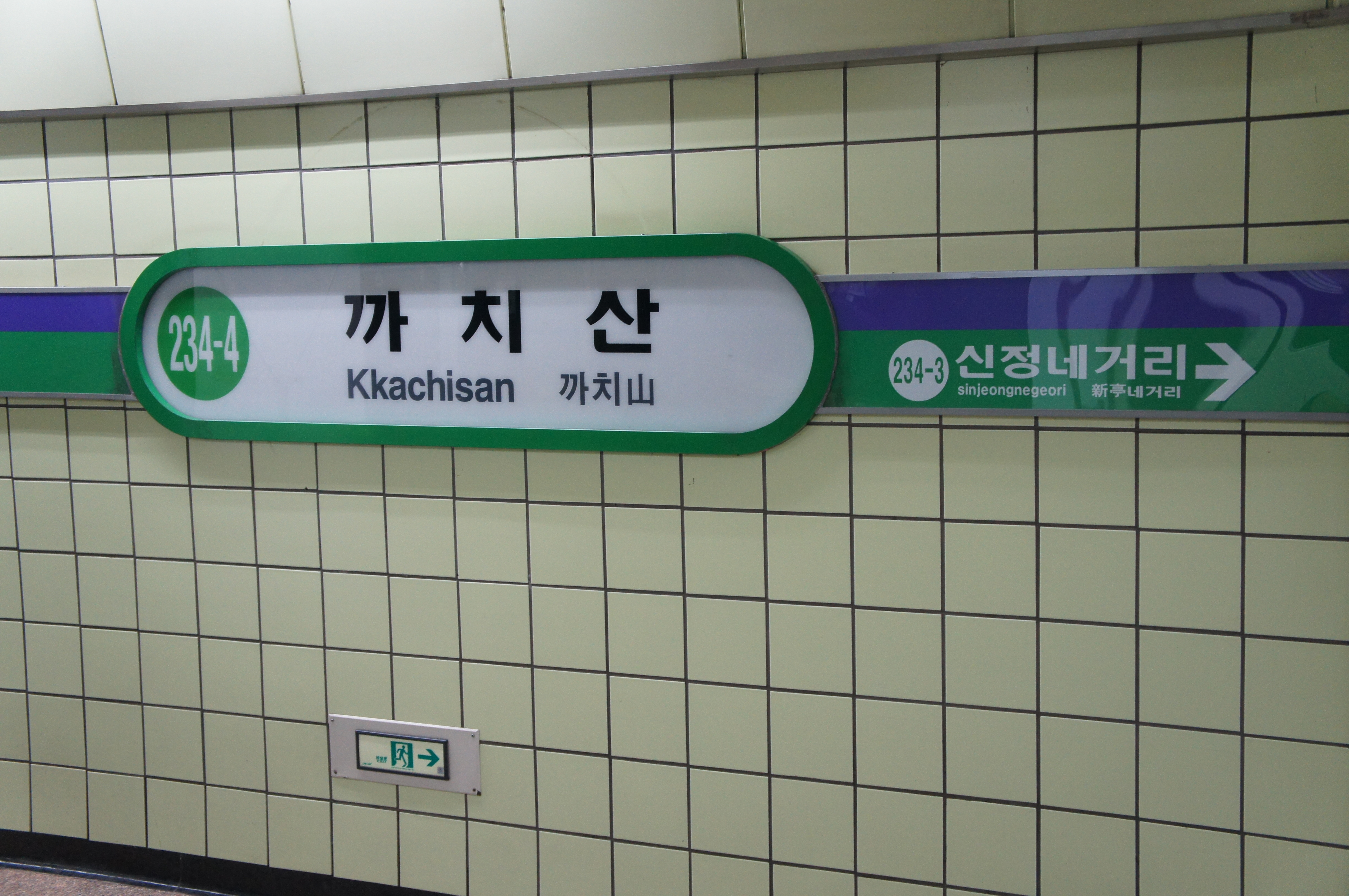 2호선 신정지선 까치산역 역명판